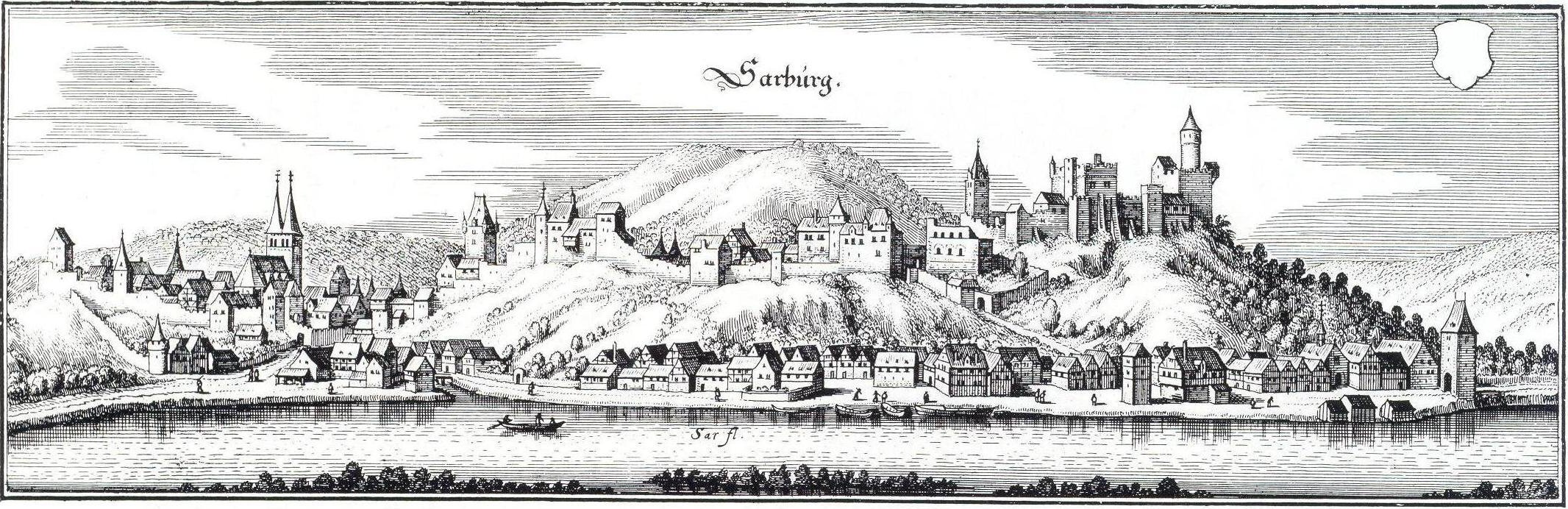 Saarburg, view by Matthäus Merian